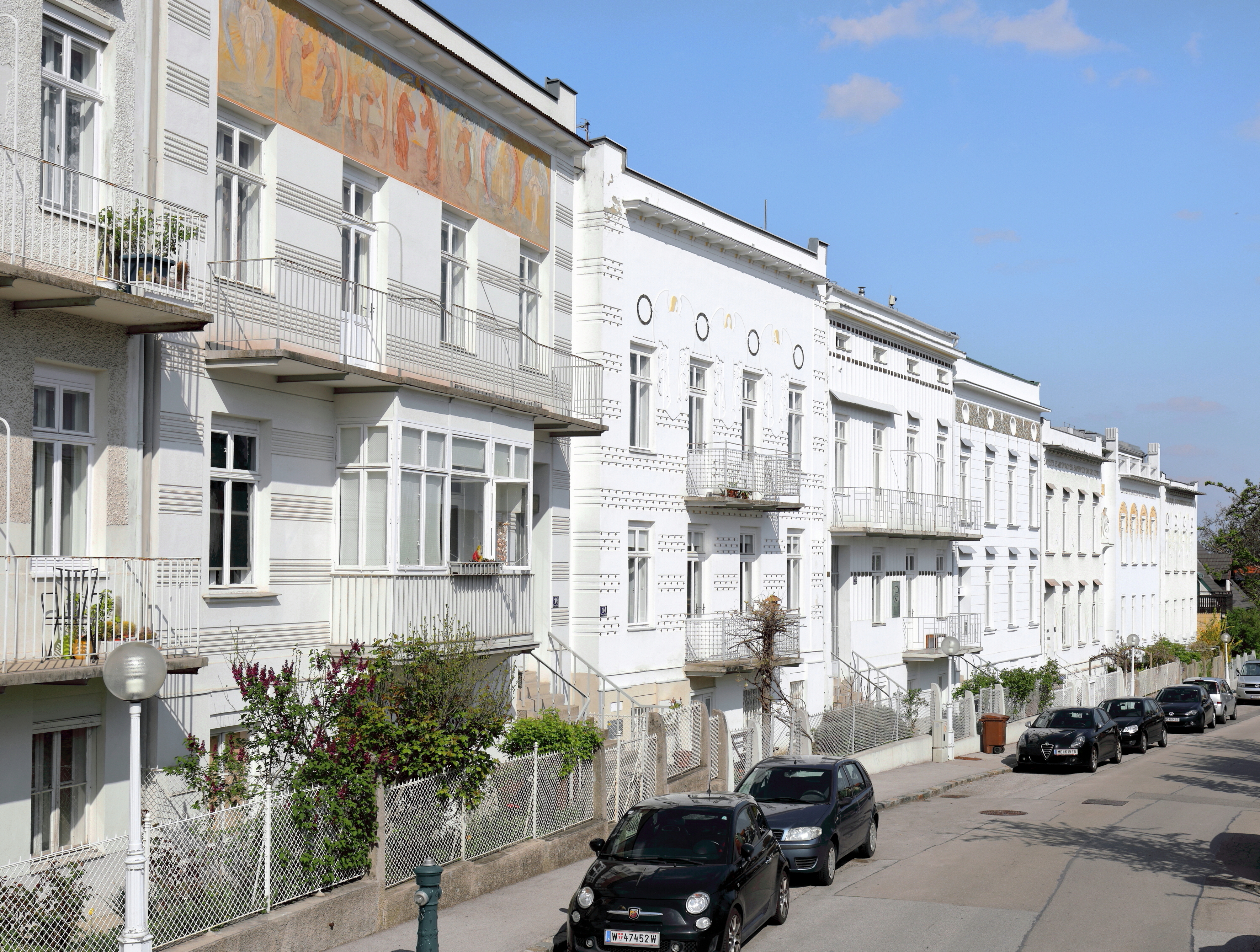 Die Jugendstil-Reihenhaussiedlung Franz Keim-Gasse 4-22 in der niederösterreichischen Marktgemeinde Brunn am Gebirge.Das Ensemble mit 10 Reihenhäusern im Stil der Wiener Secession wurde von 1902 bis 1912 von dem Architekten Sepp Hubatsch errichtet. Diese Jugendstilzeile verkörpert das einheitlichste Ensemble secessionistischer Baugesinnung in Niederösterreich.